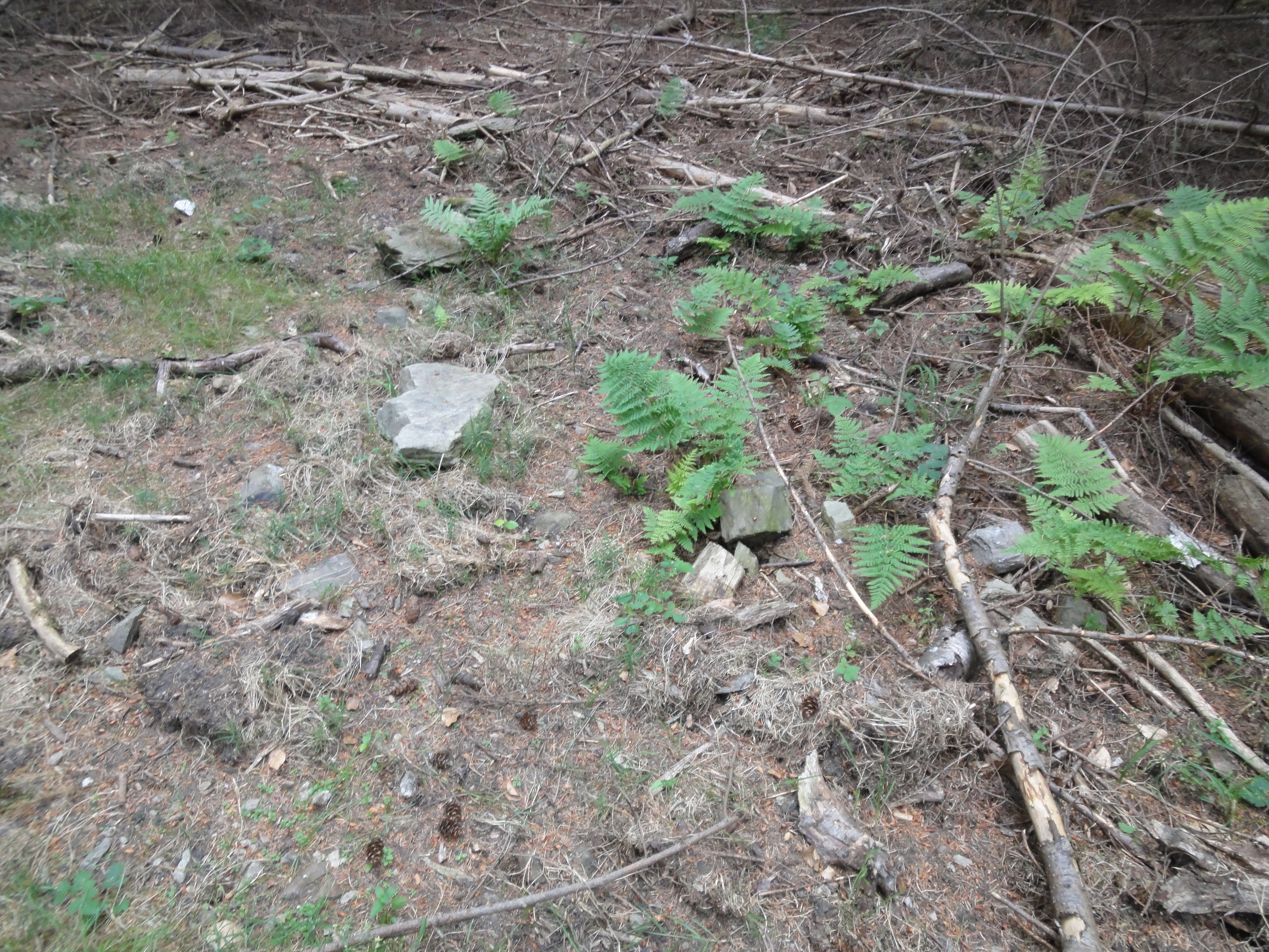 Mauerwerksreste an der vermuteten Wallanlage Würzburg bei Wiesbaden